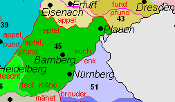 Карта немецких диалектов к 1990 году.